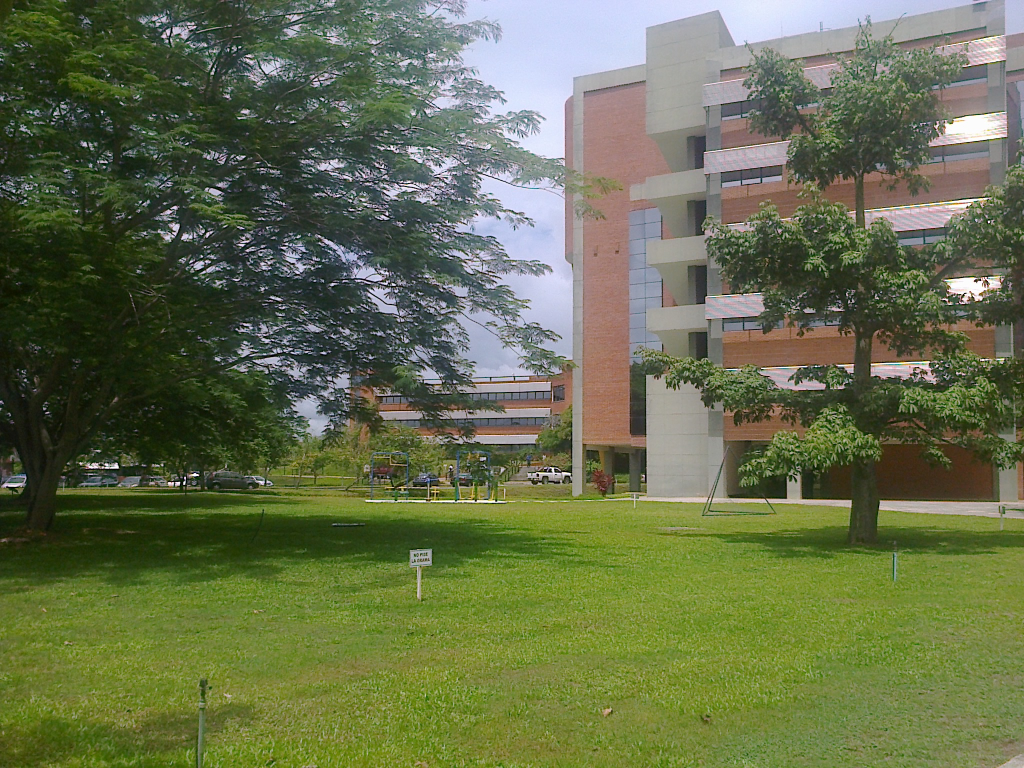 UCAB Guayana. Ciudad Guayana. Edo. Bolívar